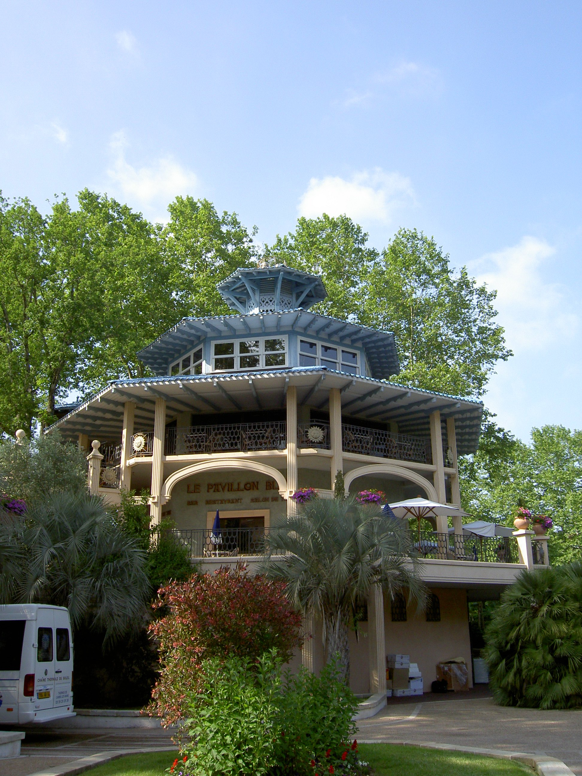 Le restaurant des thermes de Cambo-les-Bains (Pyrénées-Atlantiques, Aquitaine, France).